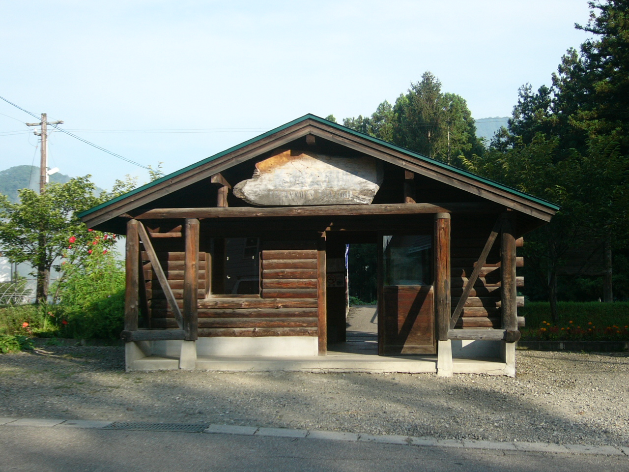 Yosonkoen Station